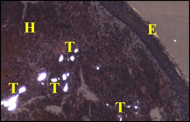 Réaction granulomateuse provoquée par des fils de compresse dans la paroi d'un cholestéatome récidivé. Vue en lumière polarisée